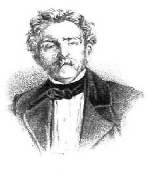 Griechischer Gelehrter, 19. Jahrhundert